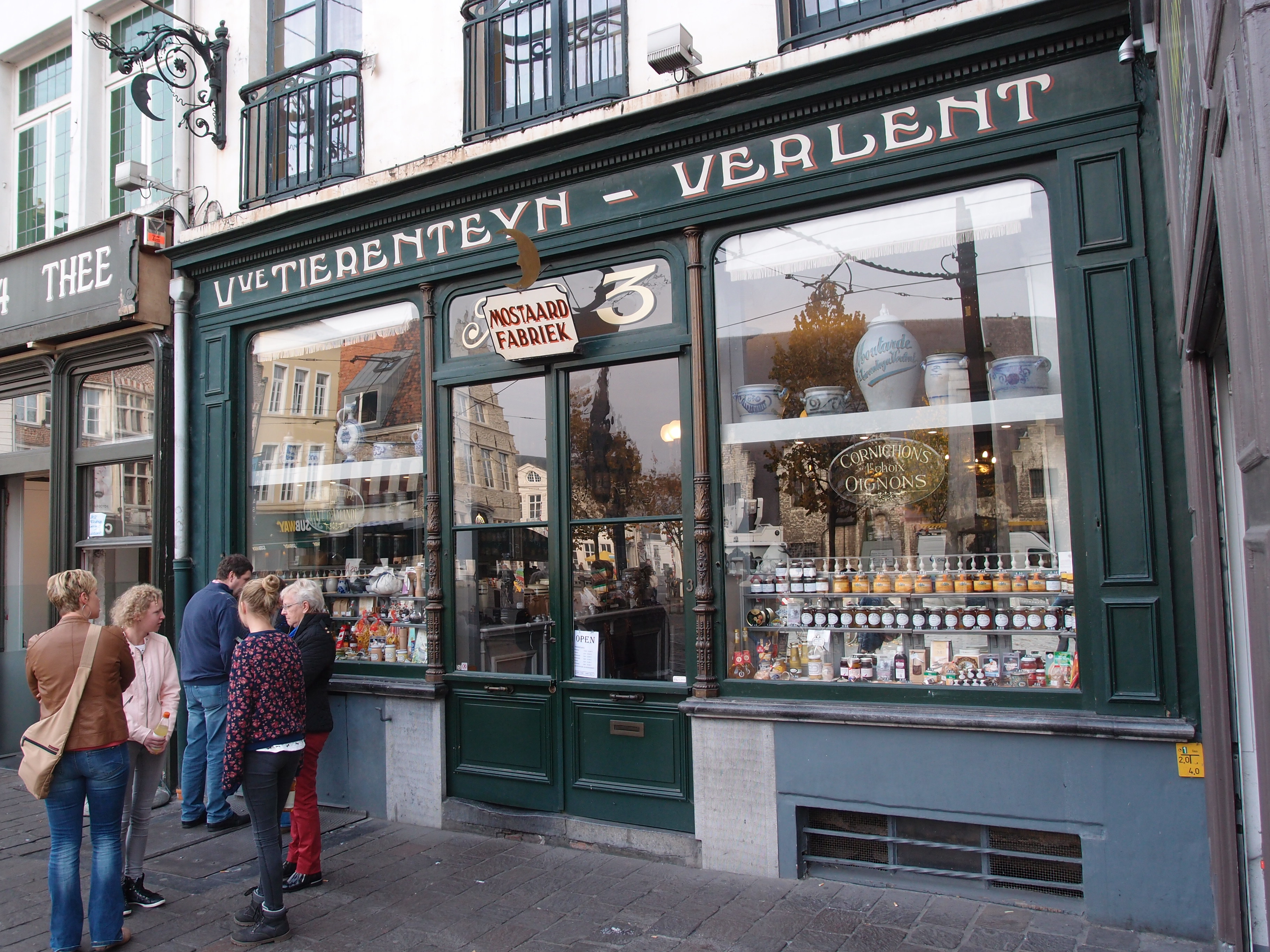 Eingang zu Tierenteyn-Verlernt (Mostaard-Fabriek) in Gent/Belgien